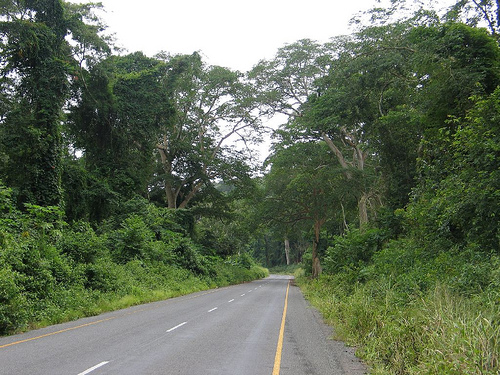 Caxito-Uíge Road